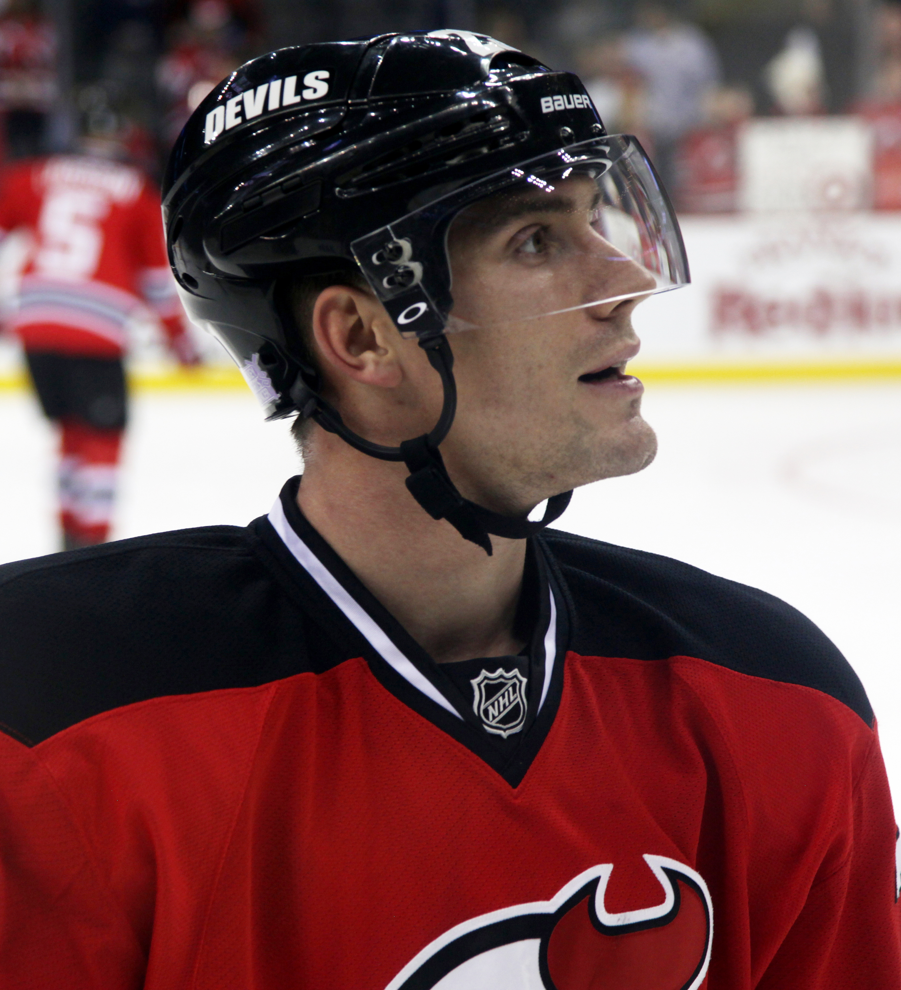 Olesz in 2013.